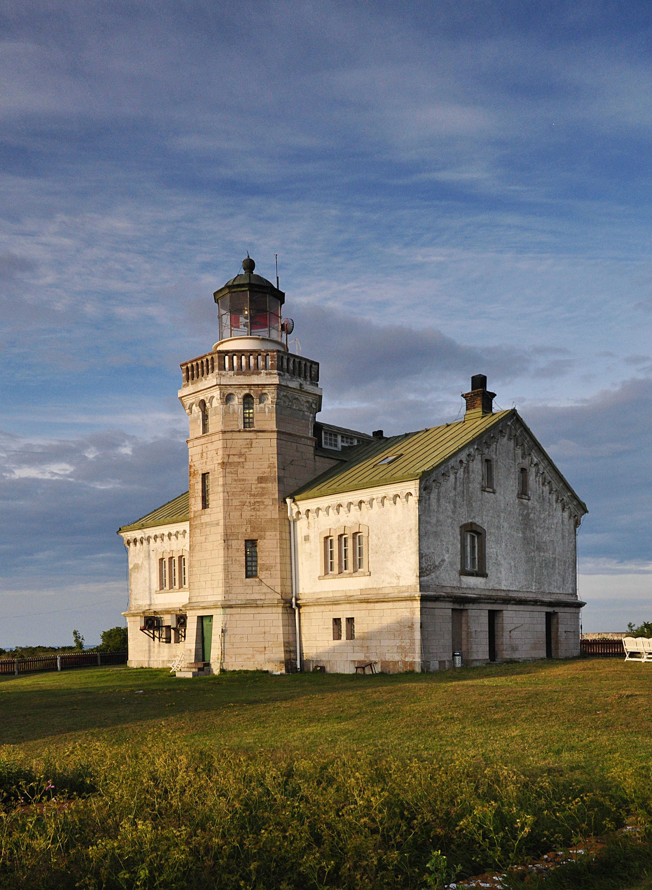 GOTLAND EKSTA STORA KARLSÖ 1:5 - husnr 3, STORA KARLSÖ FYRHUS.